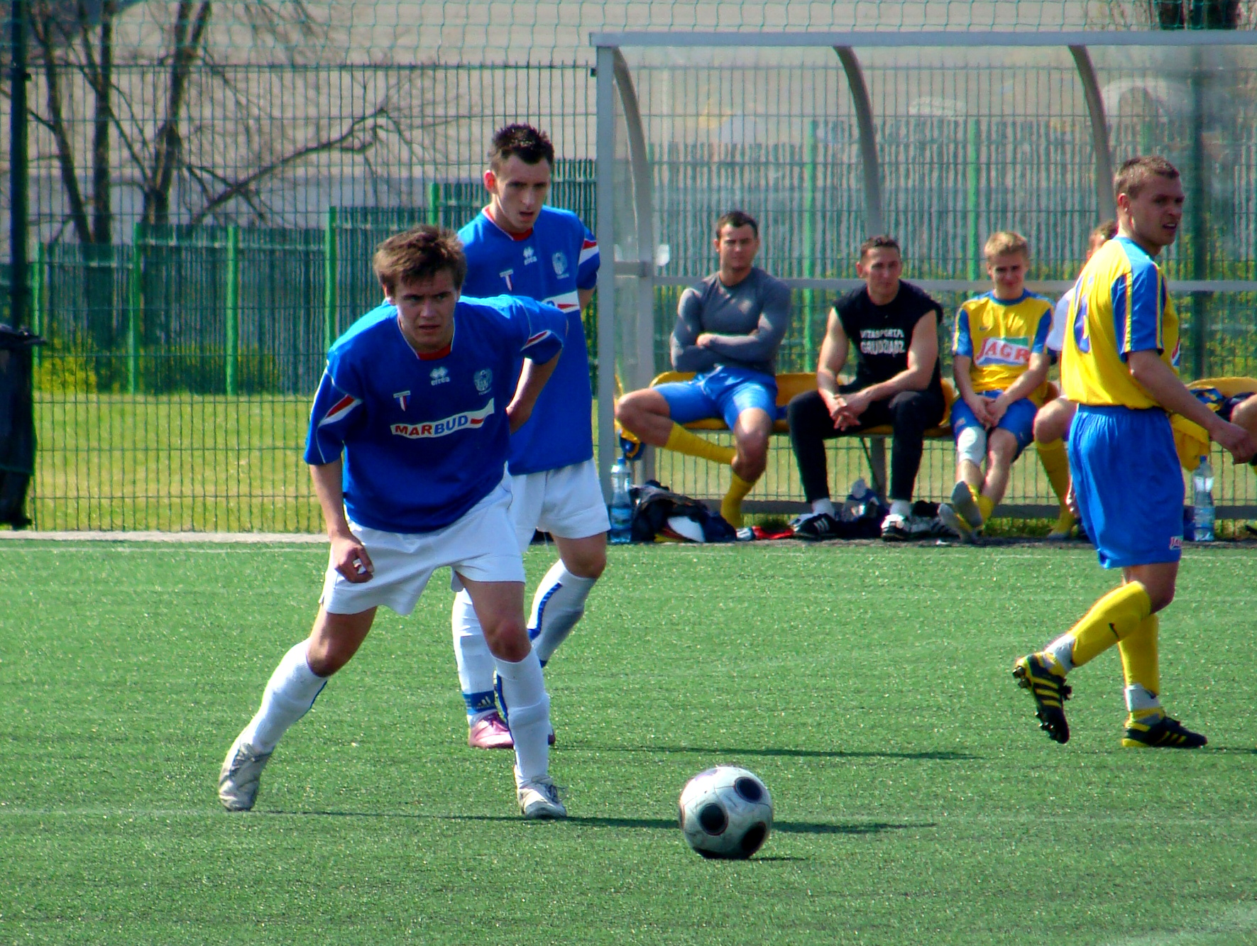 Mecz IV ligi piłkarskiej Pomorzanin Toruń - Start Warlubie (3:1)